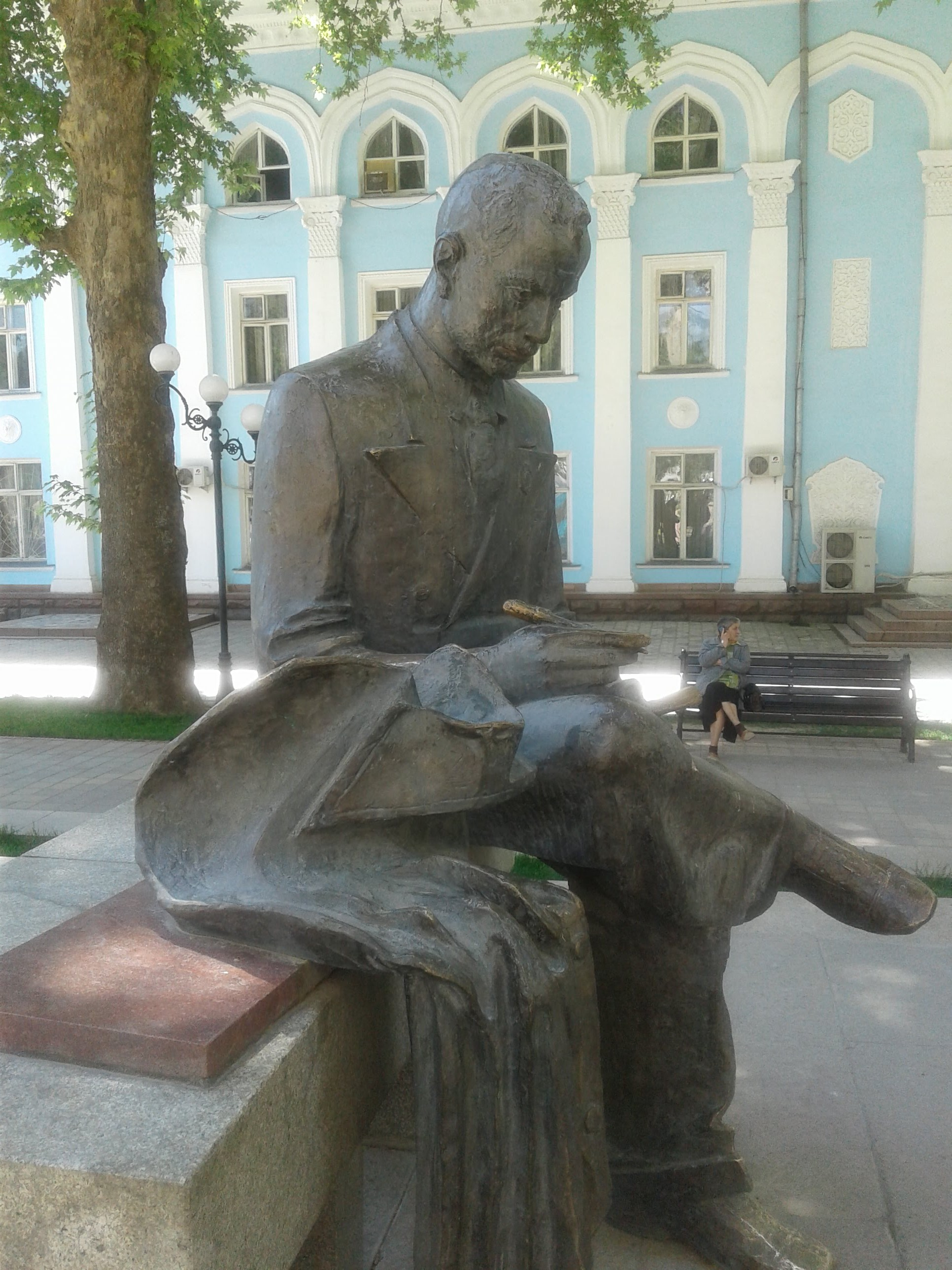 Абулькасим Лахути (перс. ابوالقاسم لاهوتی, тадж. Абулқосим Лоҳутӣ, 12 октября 1887, Керманшах, Иран — 16 марта 1957, Москва) — персидский-таджикский советский поэт и политический деятель, классик современной таджикской литературы. Бюст Лахути установлен в г. Душанбе